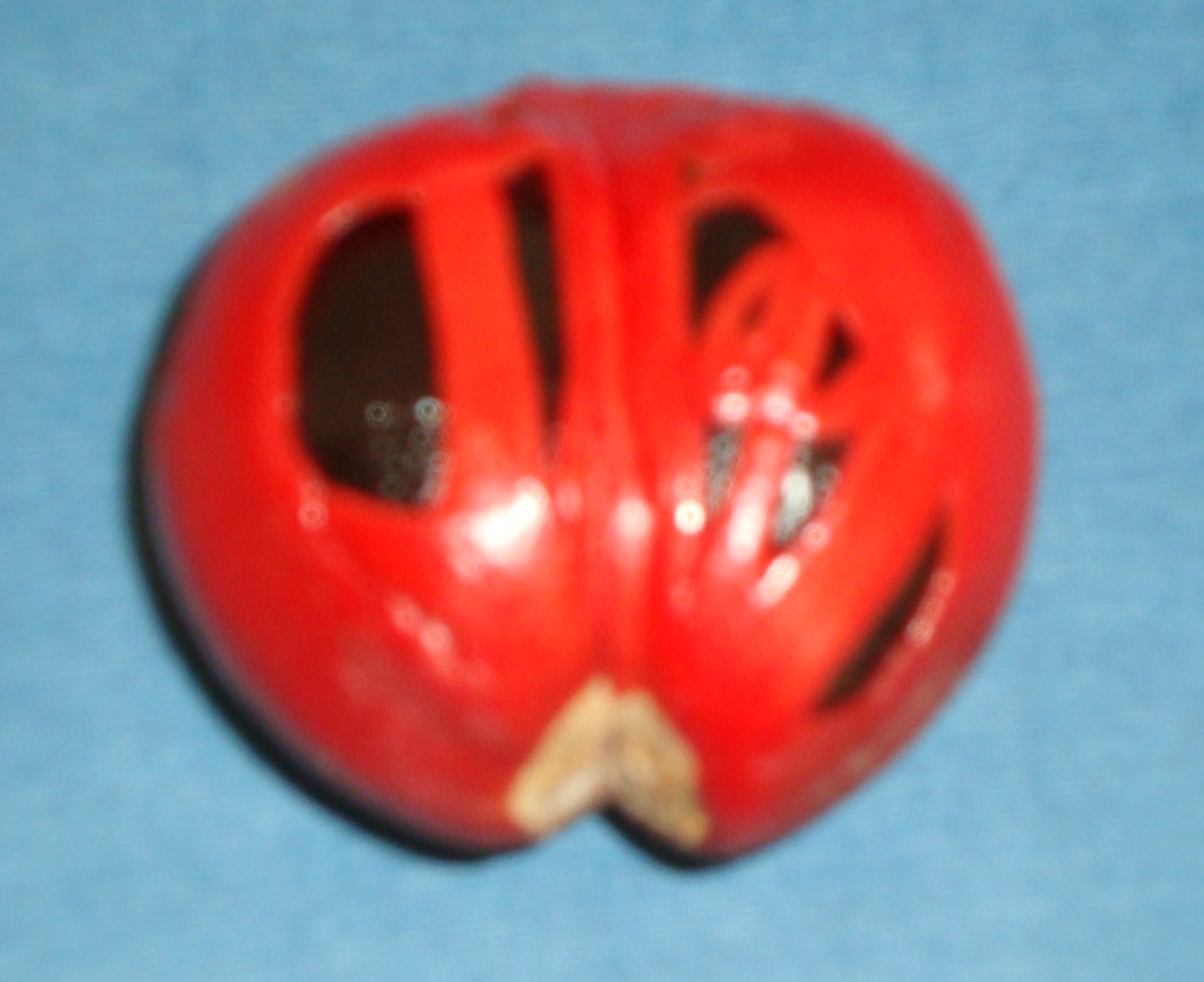 ജാതിക്കയുടെ ഇരട്ടവിത്ത്